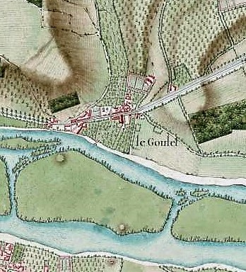 Cadastre - Île aux Bœufs sur la Seine, à hauteur des communes de Notre-Dame-de-l'Isle (rive droite, sud de la carte) et du hameau du Goulet (rive gauche, au nord). Au nord comme au sud de l'île sont représentées des mottes castrales.